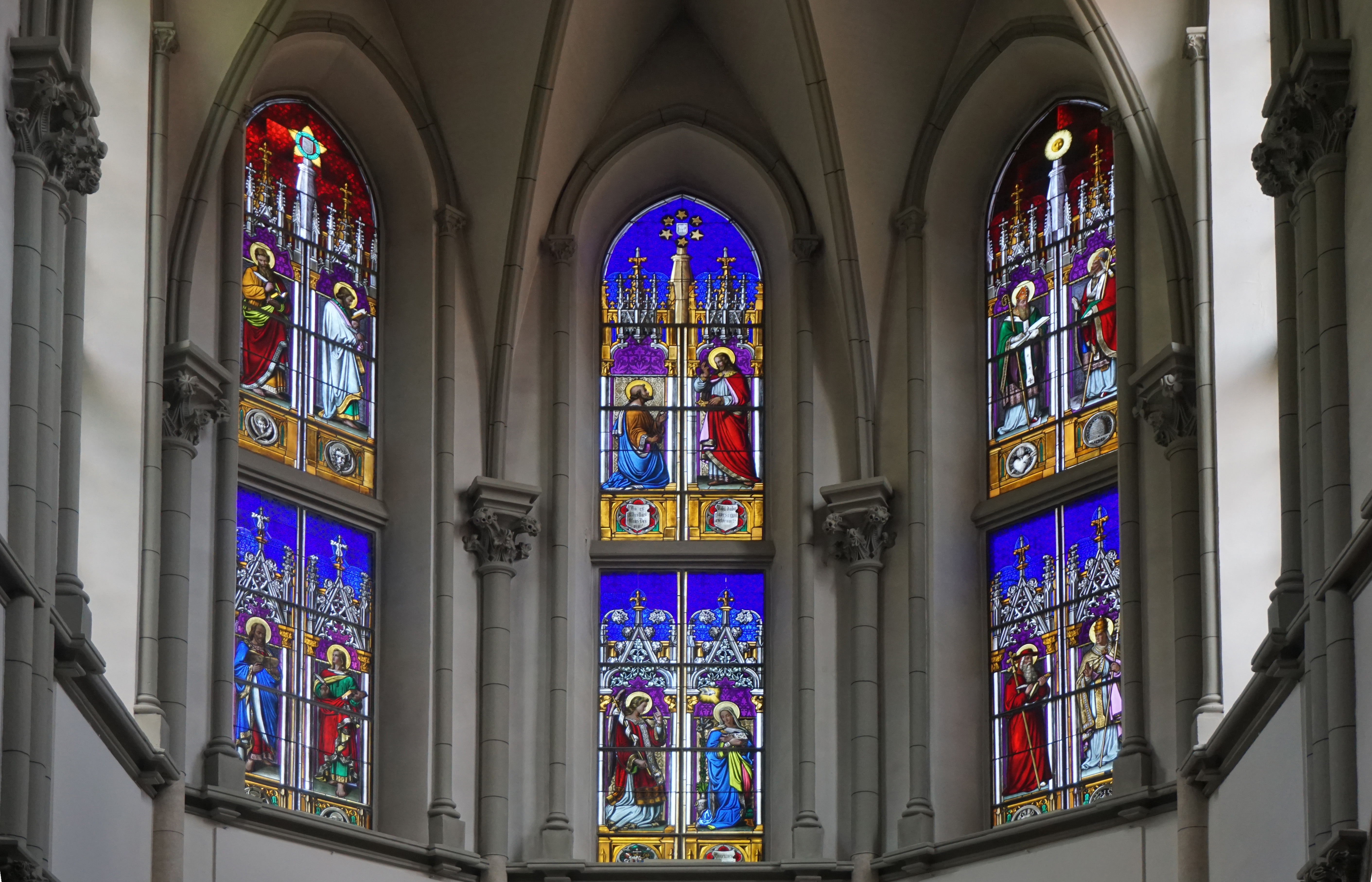 Saint-Martin Chorfenster vonJohann-Jakob Röttinger, 1865.